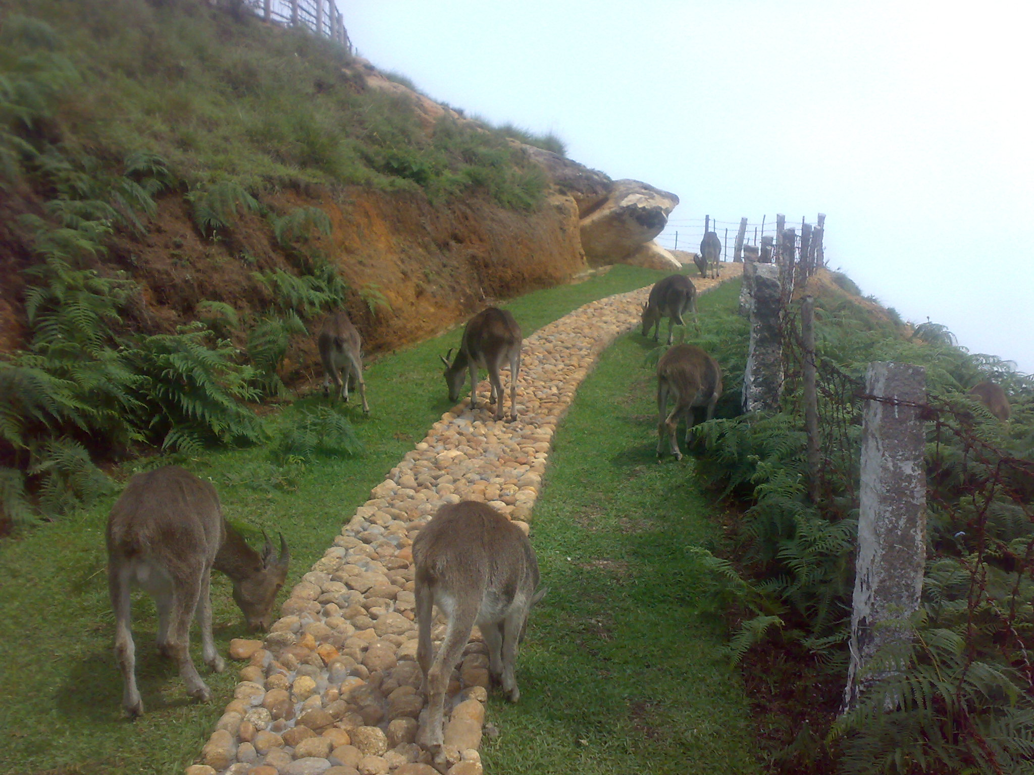 ഇരവികുളത്തുനിന്നും ദൃശ്യമായ വരയാടിൻ പറ്റം